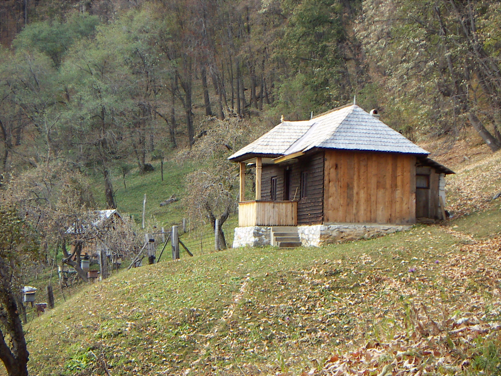 Chiliile schitului Cioclovina de Jos, construit în anul 1715, aparţinând de Mânăstirea Tismana, oraşul Tismana, Gorj 03